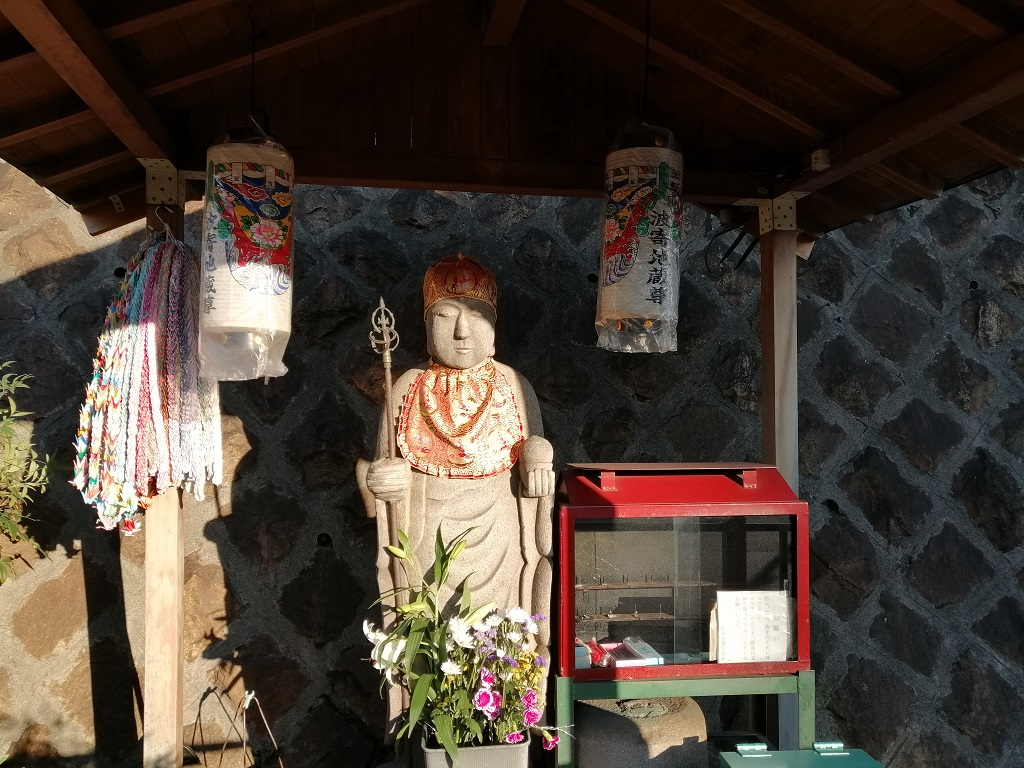 波寄地蔵尊 （名古屋市熱田区）